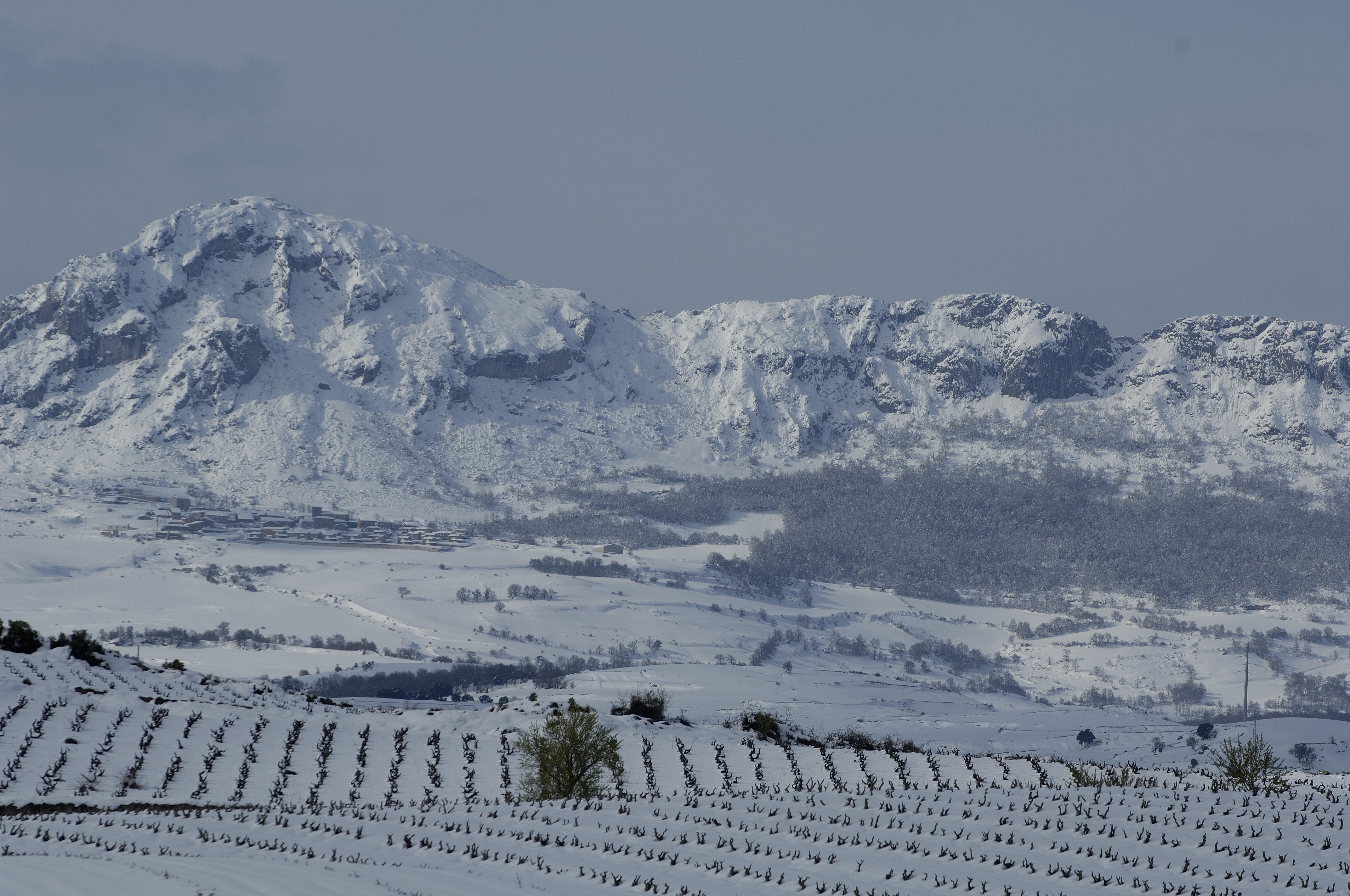 Elurtea Arabar Errioxan